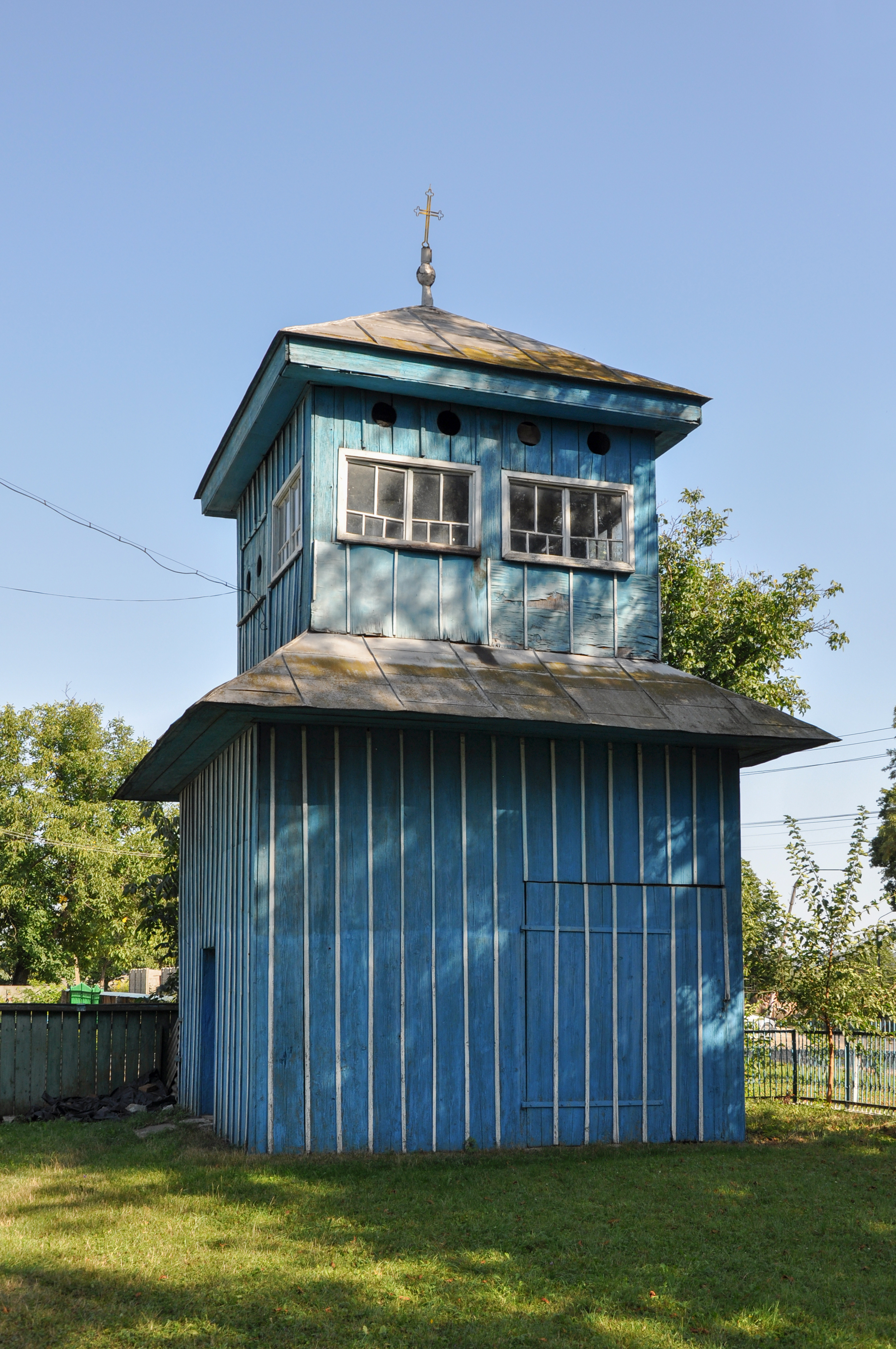 Дзвіниця Вознесенсь-кої церкви (дер.), смт.Лужани